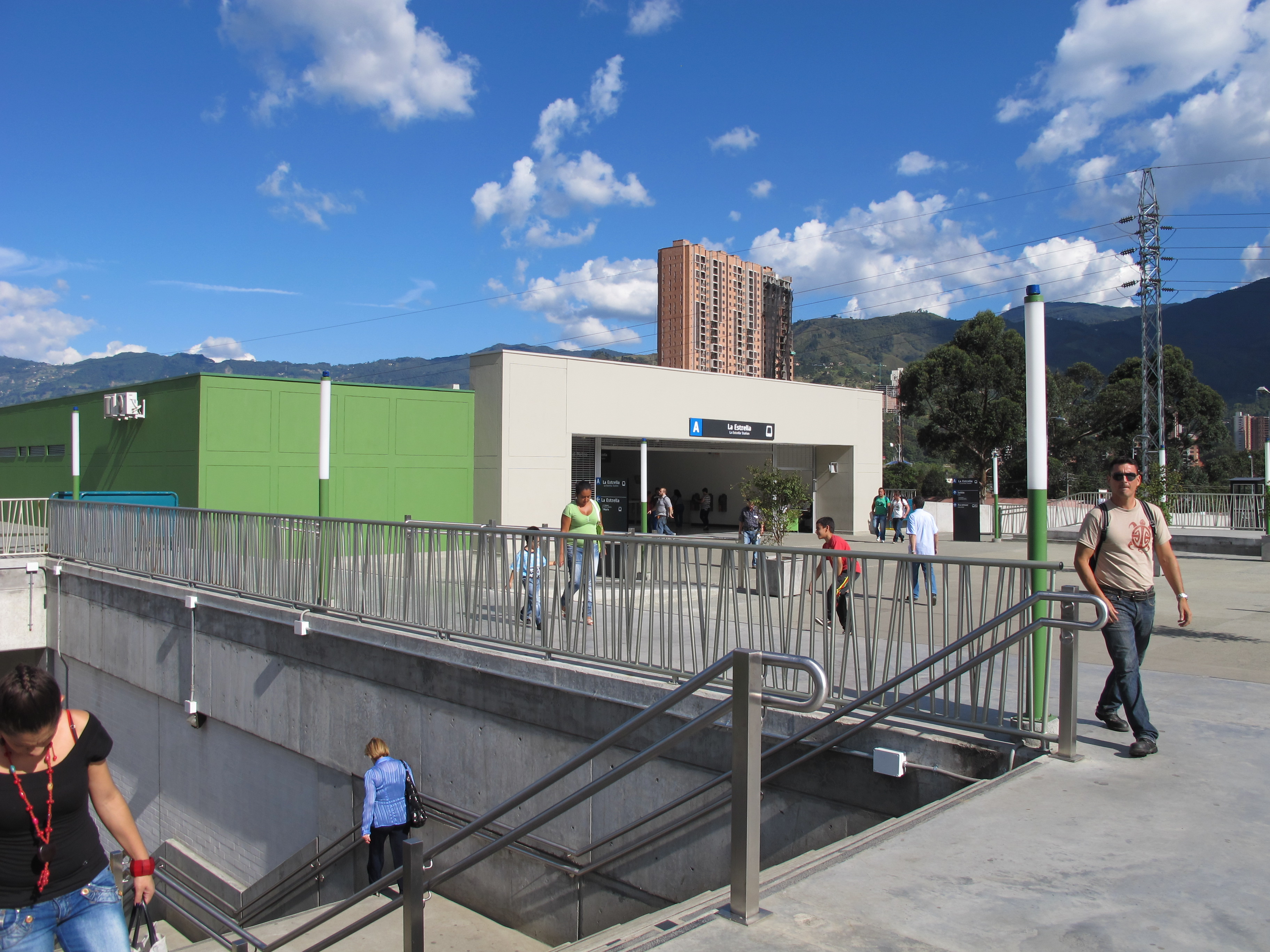 Estación La Estrella del Metro de Medellín